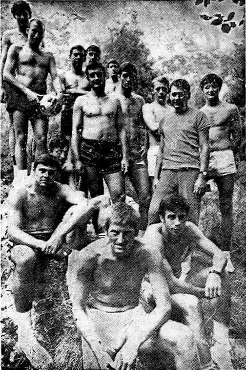 Jugoslovanski košarkarski reprezentanti